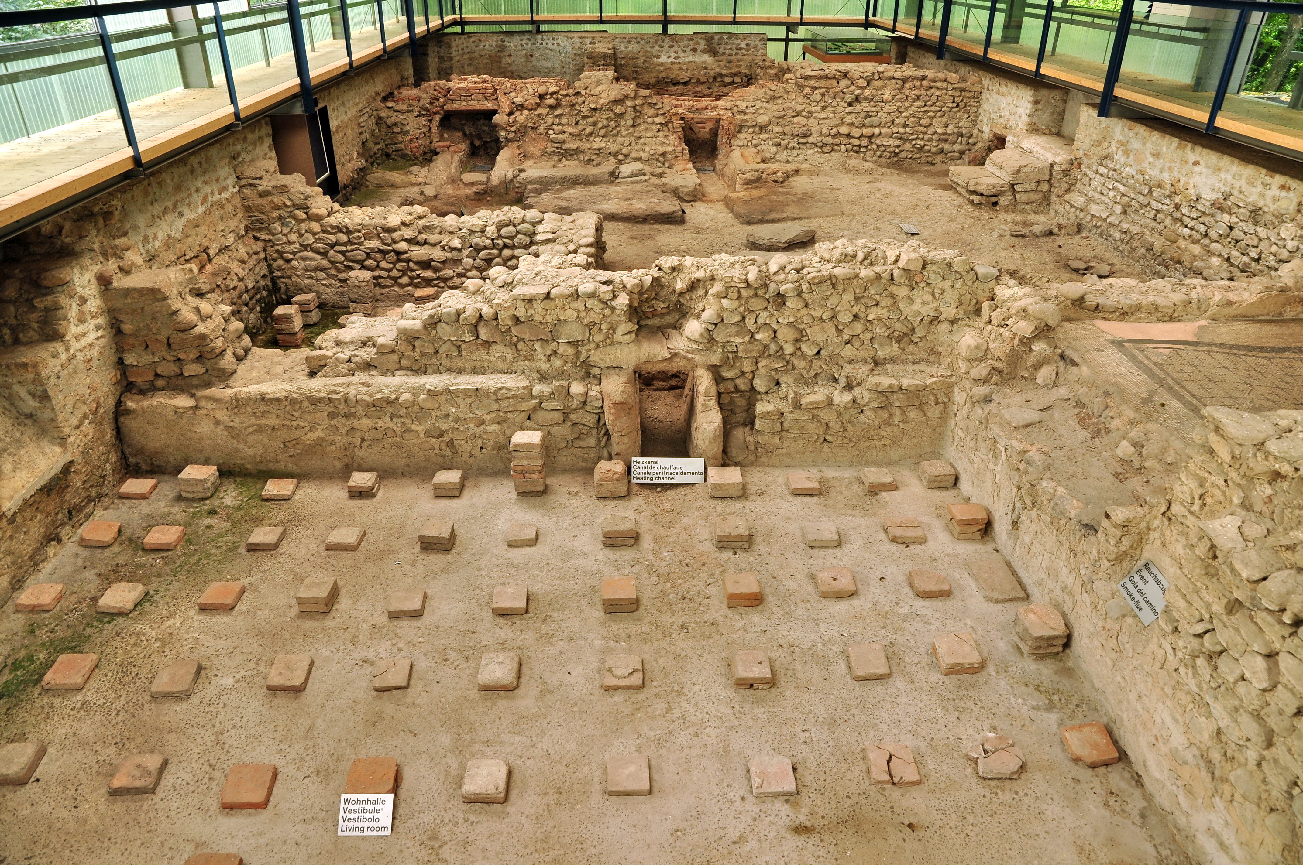 Herrenhaus A, römischer Gutshof «Seeb» in Winkel bei Bülach (Switzerland)